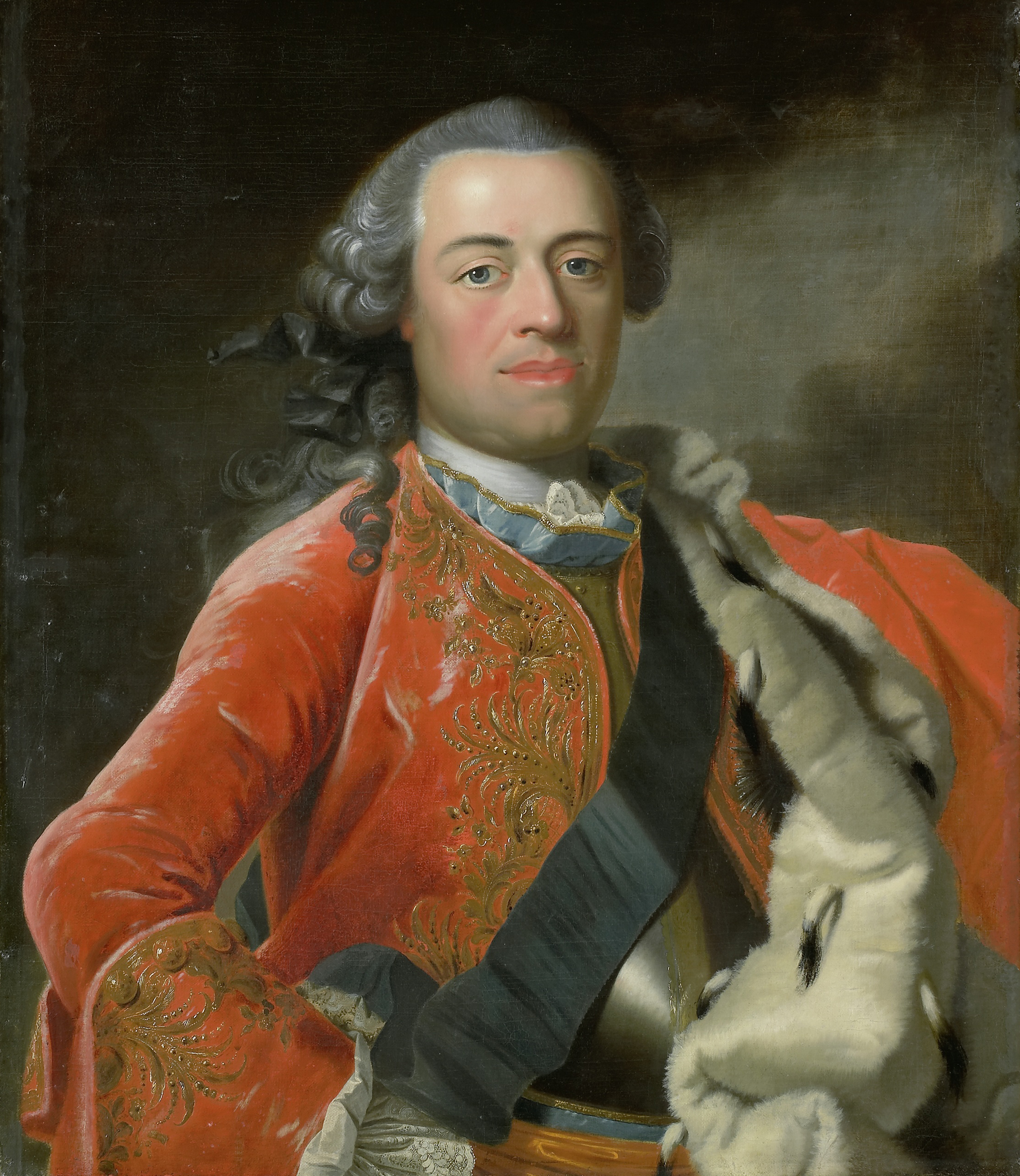 Portret van Willem IV (1711-51), prins van Oranje-Nassau. Staand, ten halven lijve, een hermelijnen mantel over de linkerschouder.